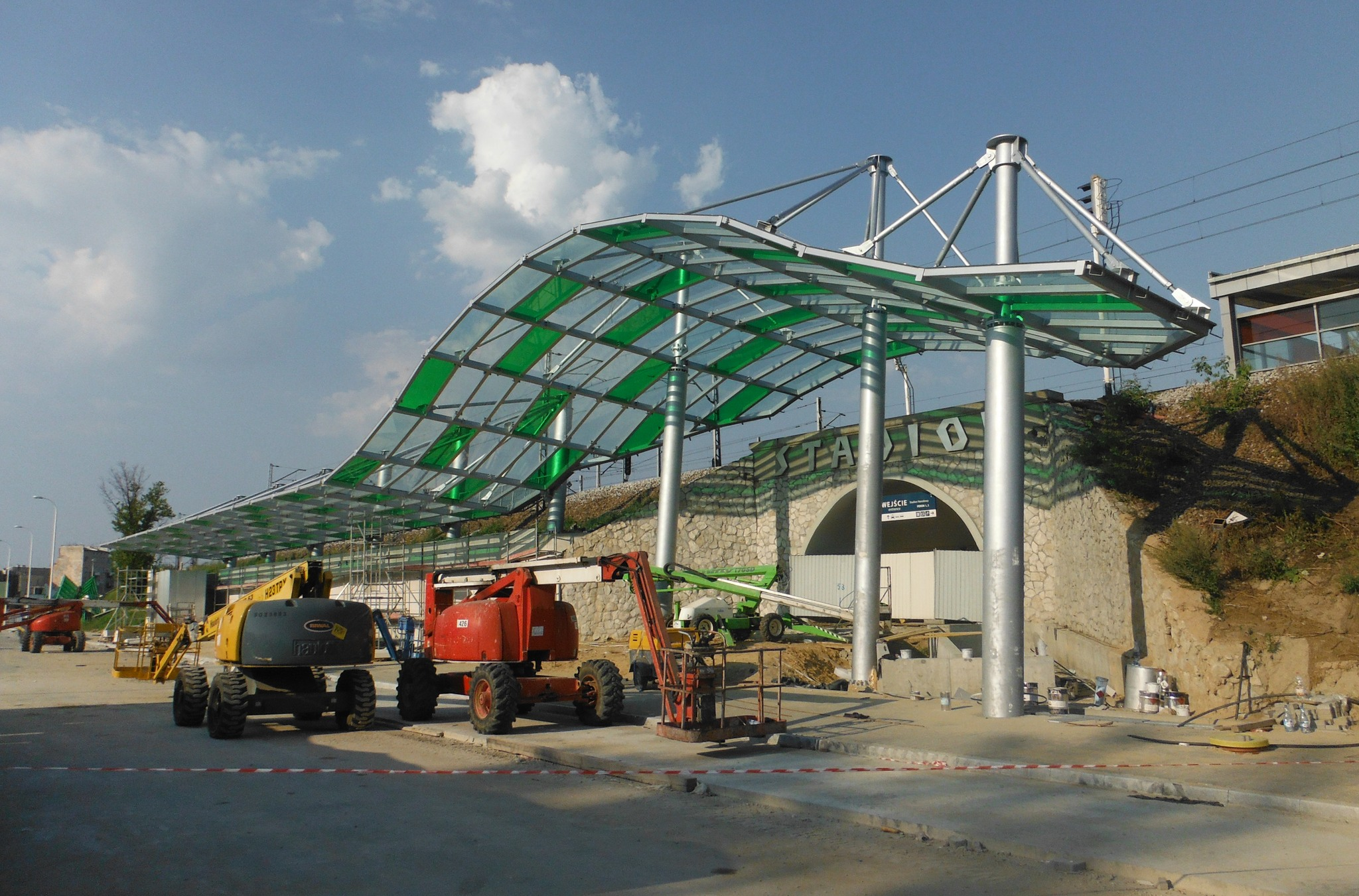 Zadaszenie przejścia ze stacji "Stadion Narodowy" na dworzec "Warszawa Stadion" stan z 2 sierpnia 2014).